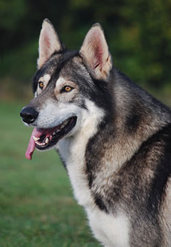 Chien inuit du Nord